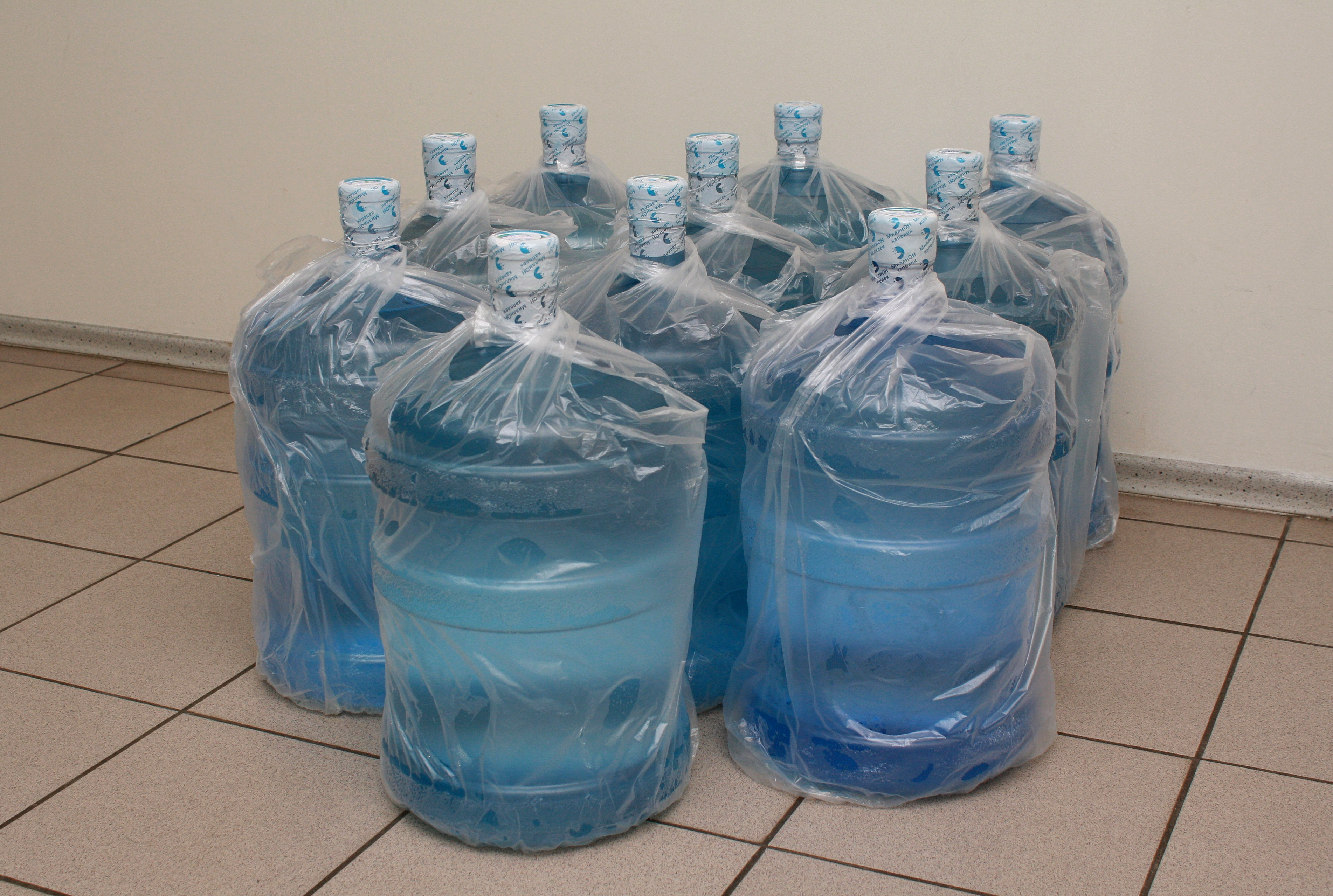 Бутилированная вода